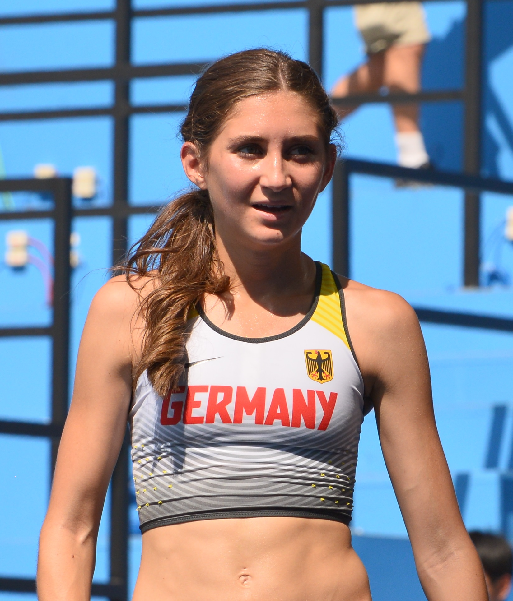 Gesa Felicitas Krause en finale du 3000m steeple des JO de Rio, 2016